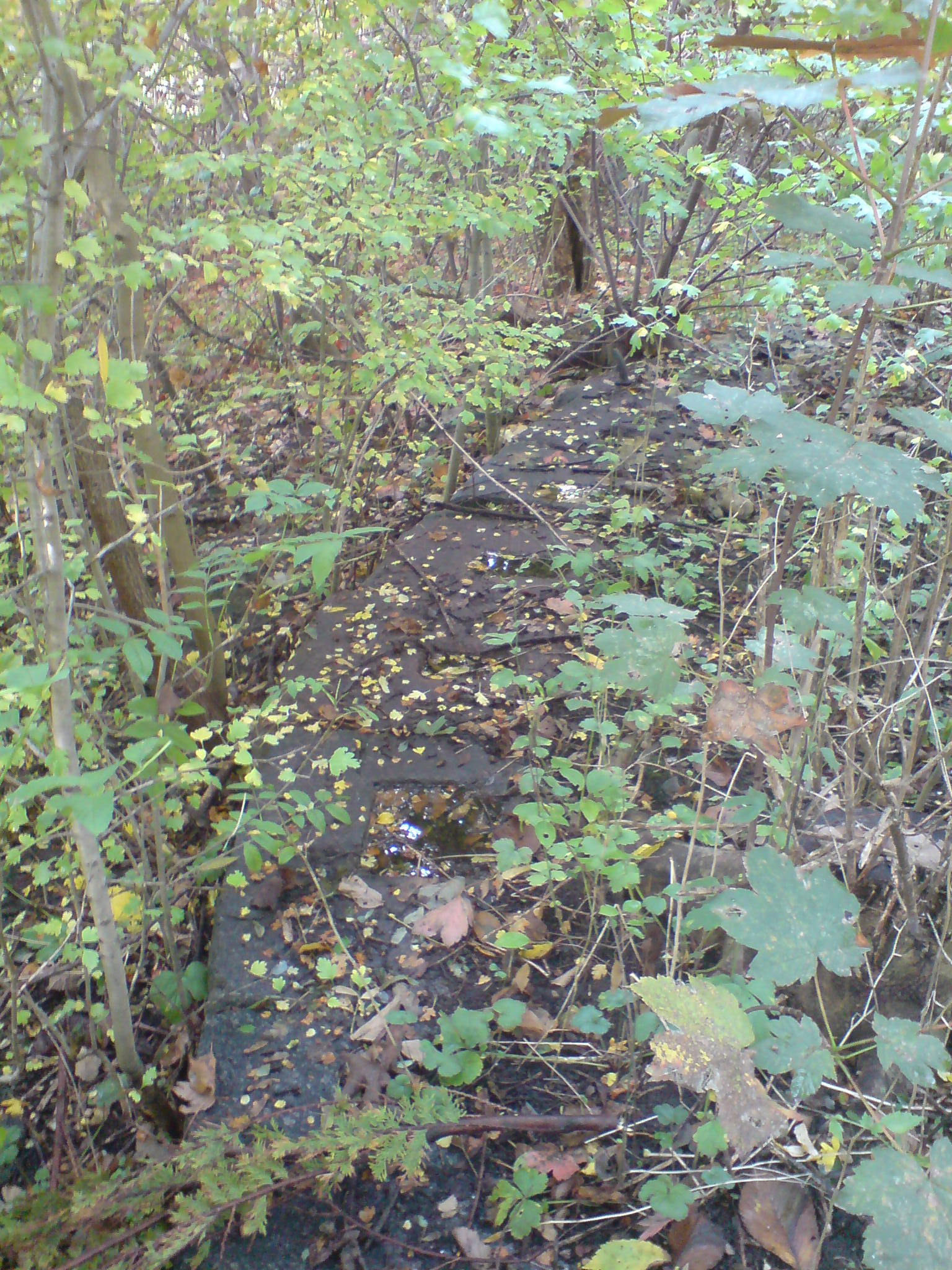 Geschützstellung, Ring mit Einkerbungen für das Geschütz